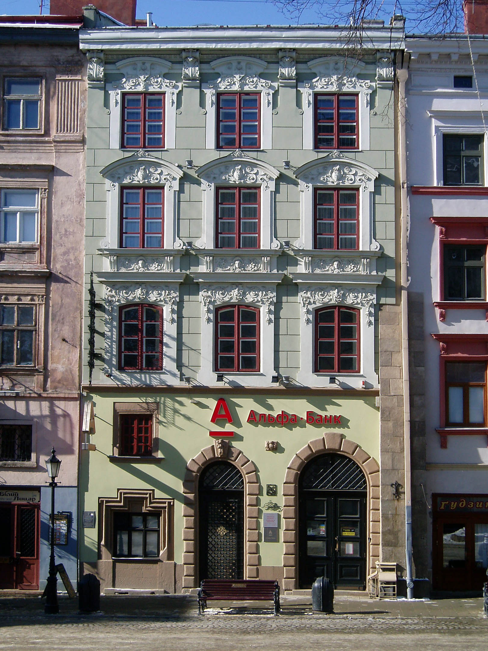 Здание «Альфа-Банка» на Площади Рынок во Львове.